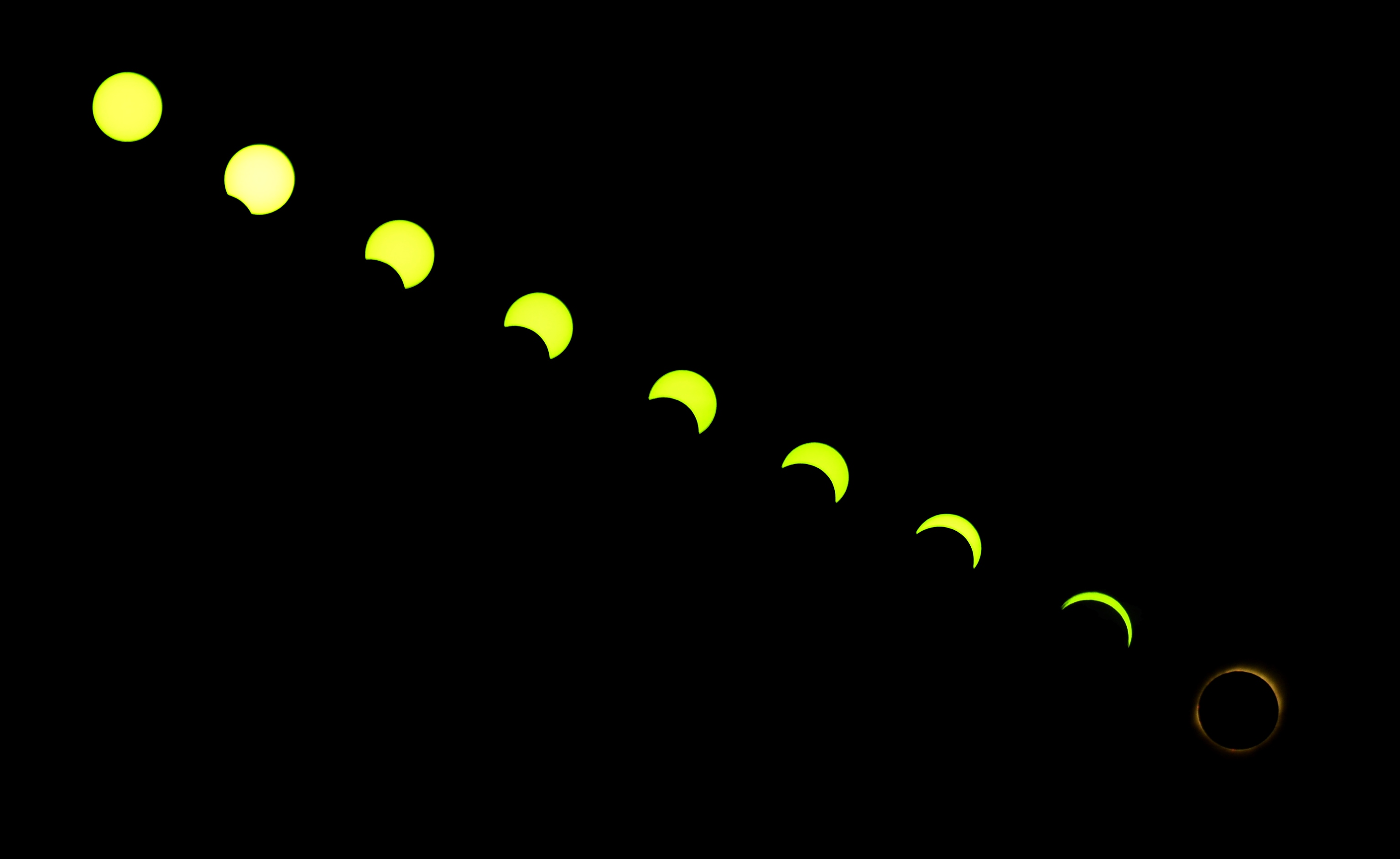 Total solar eclipse seen from Alejo Ledesma.